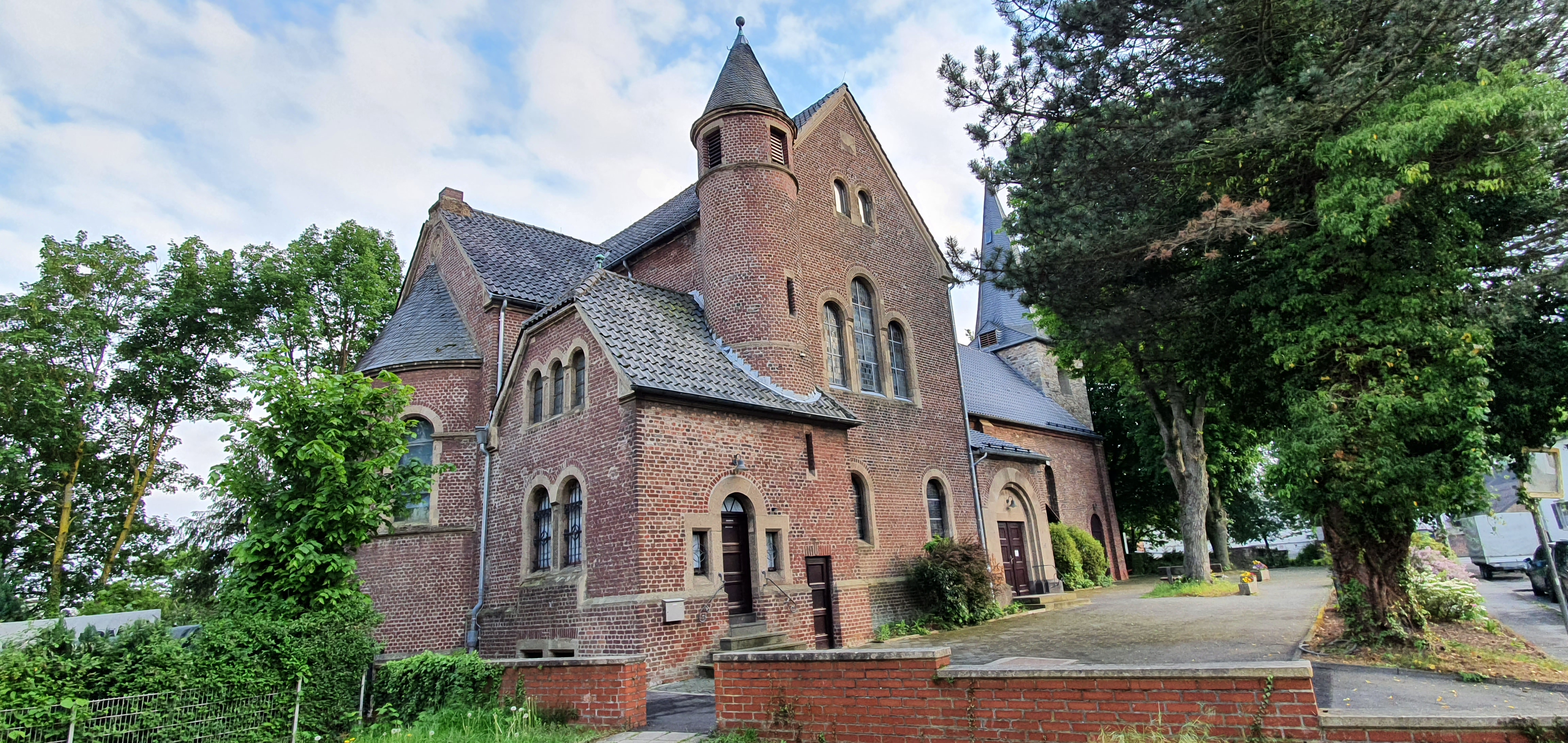 St. Willibrord Euchen (Würselen) 01 von 01